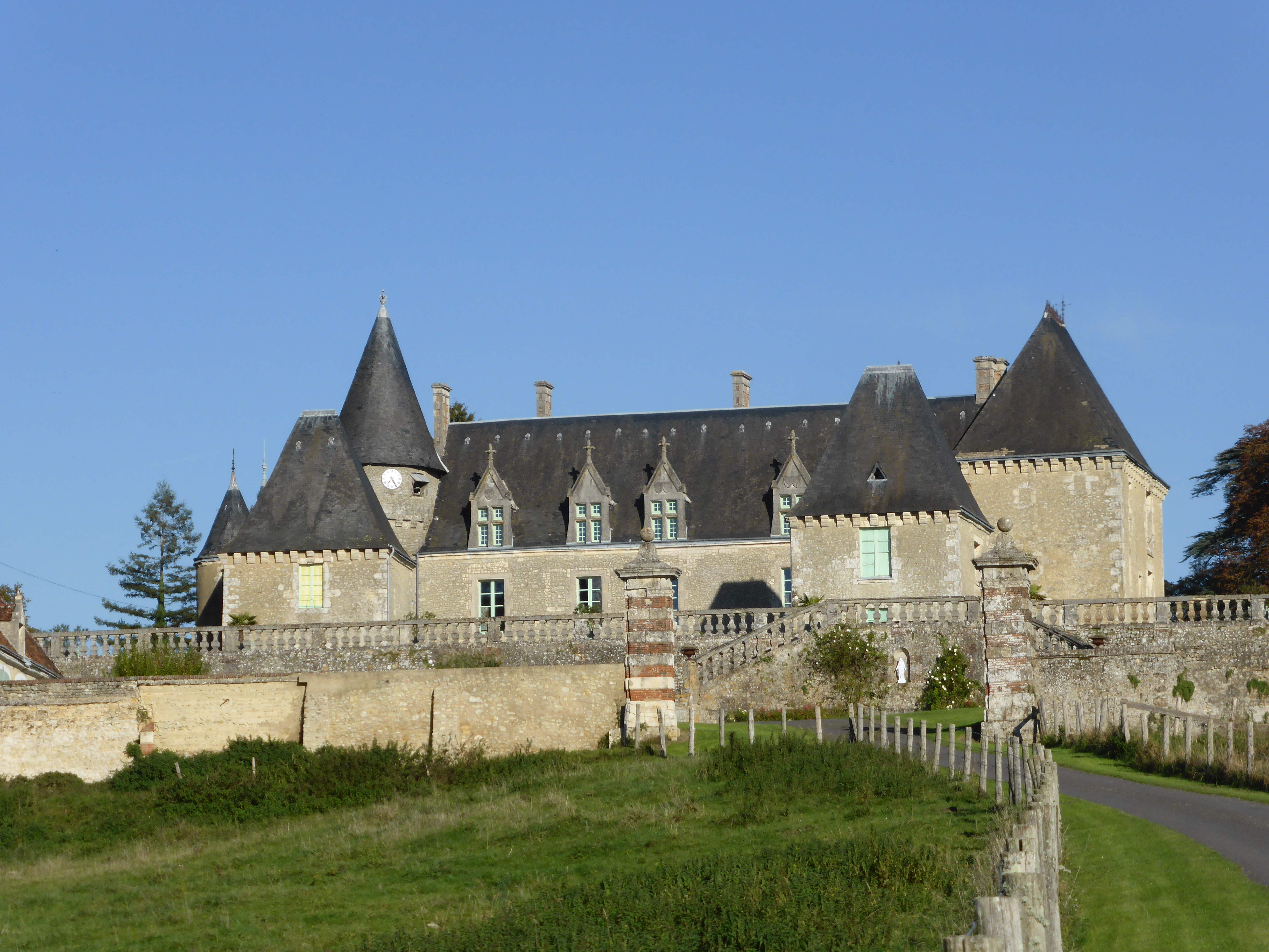 Château des Feugerets, à Appenai-sous-Bellême, dans l'Orne.